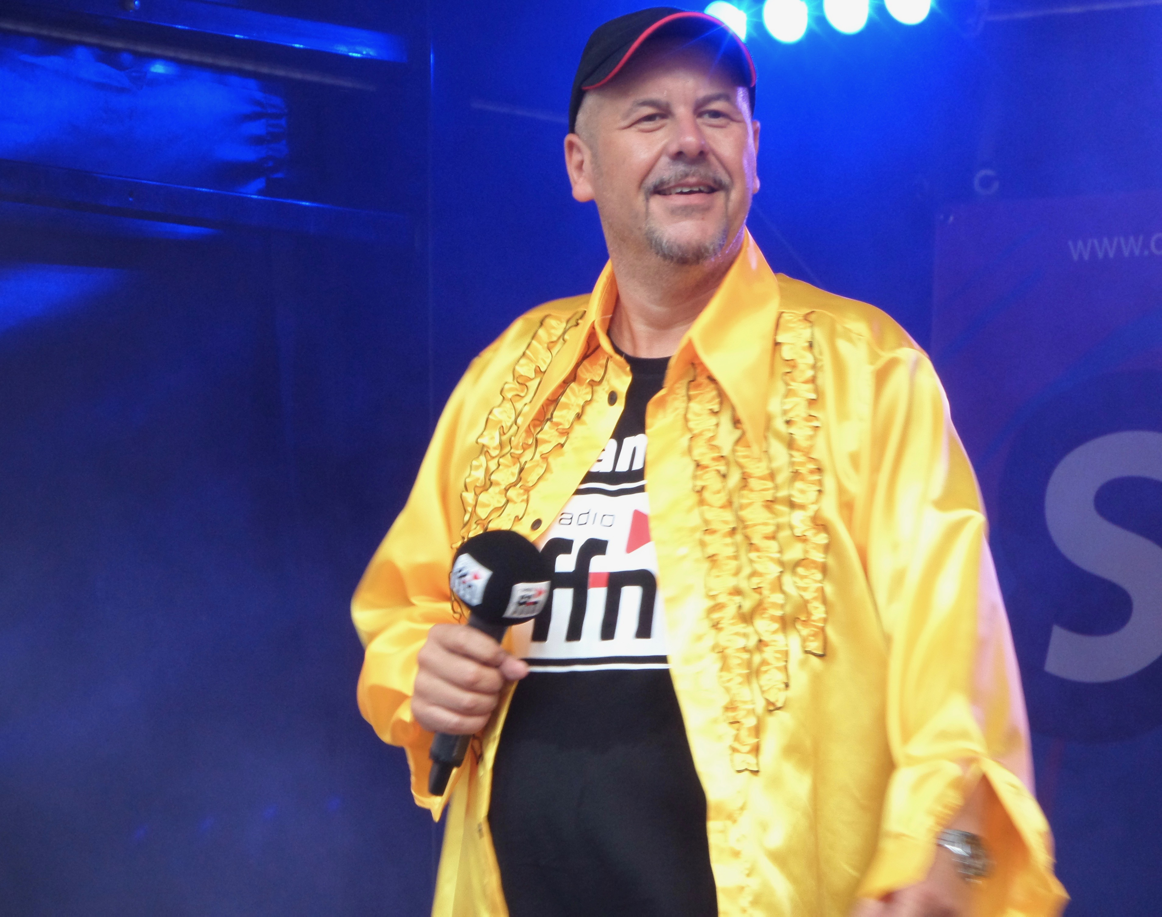 ffn-Morgenmän Fränky bei der Summer of Love-Party in Oldenburg